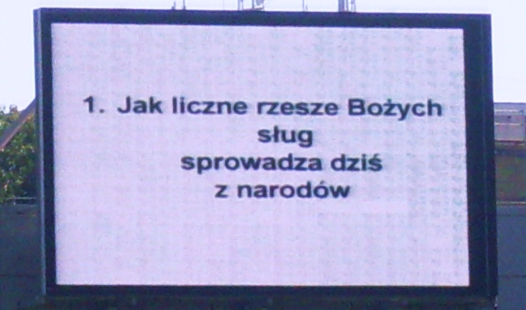 Tekst Pieśni Królestwa na telebimie. Stadion Cracovia 2011